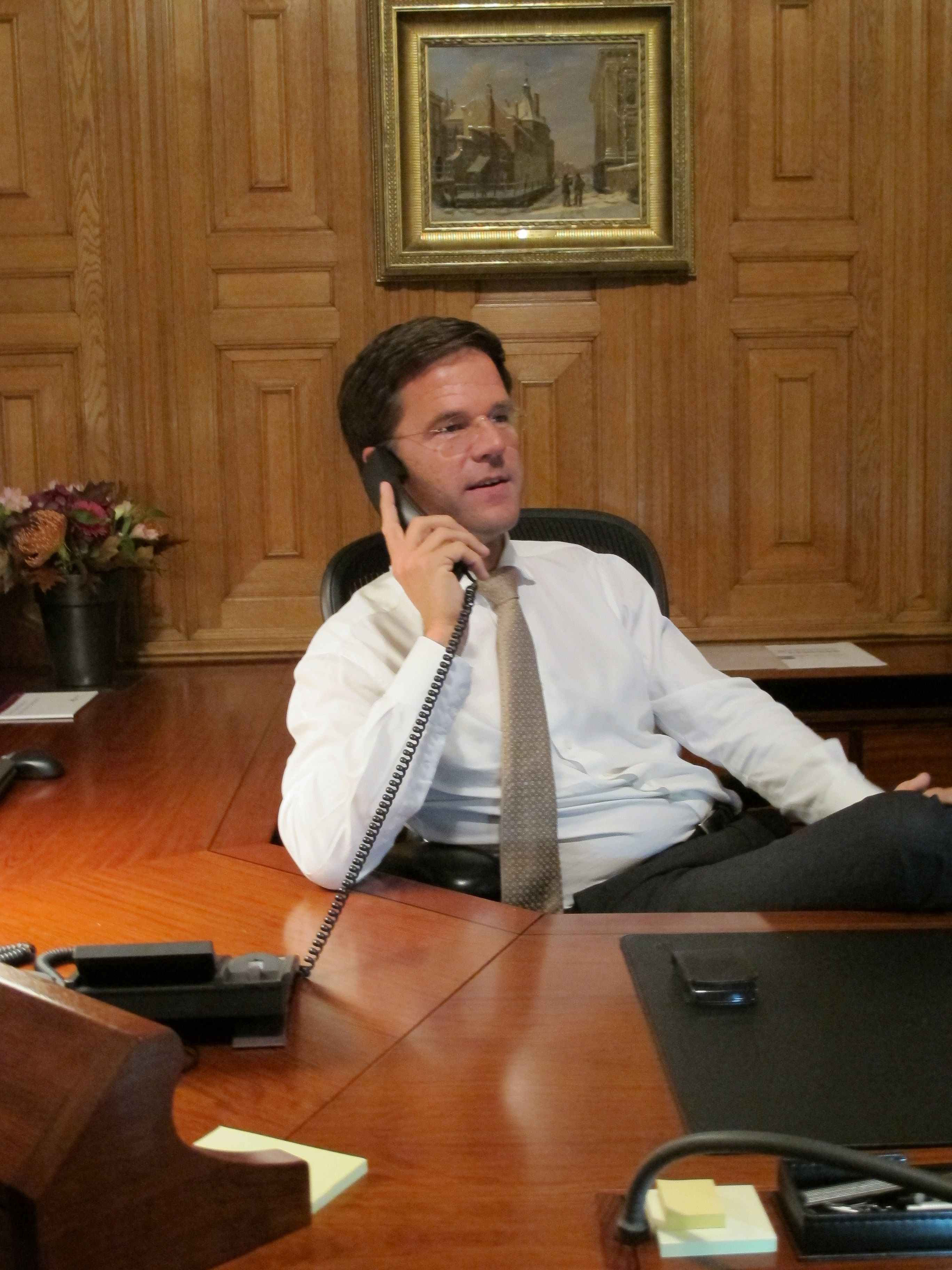 03-11-2010. President Obama belt met minister-president Rutte om hem te feliciteren met zijn aantreden.